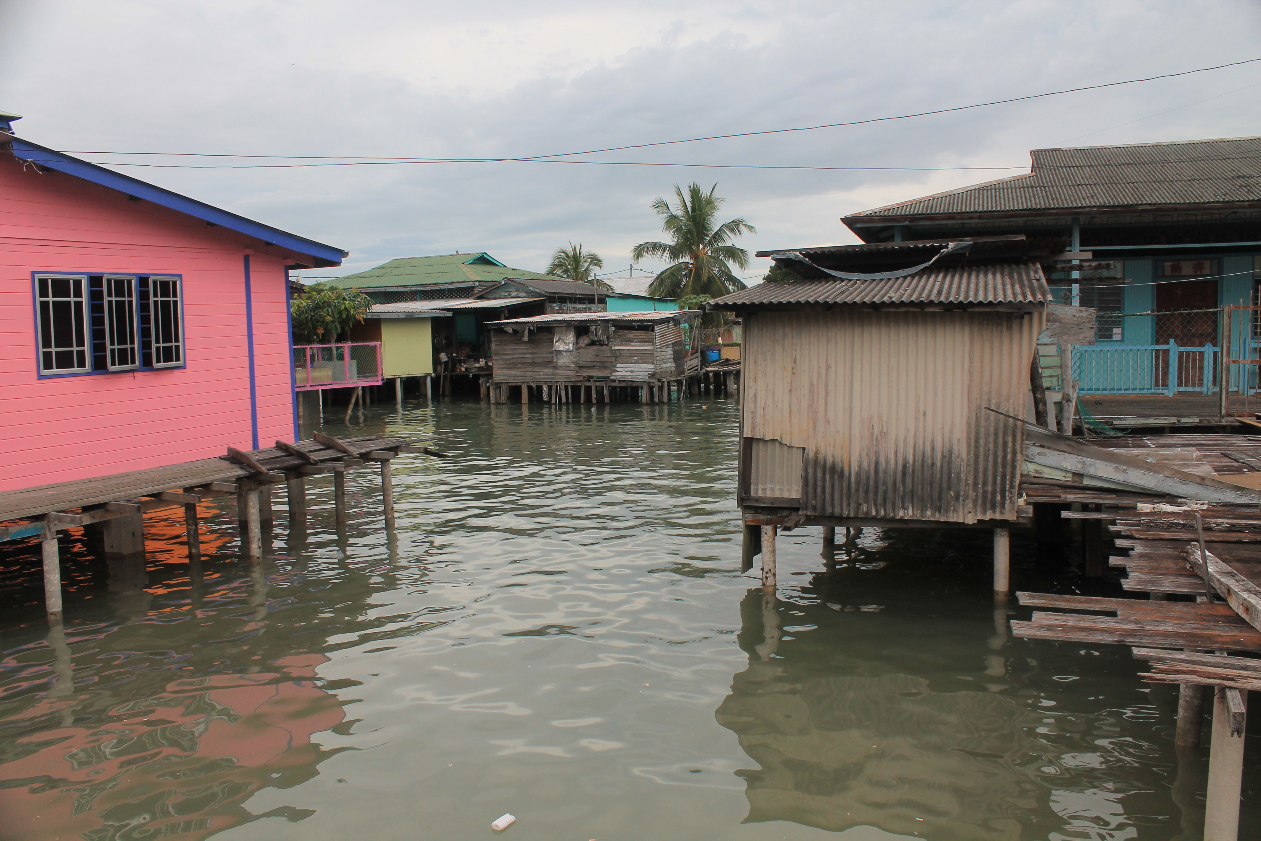 吉胆岛景观：涨潮。